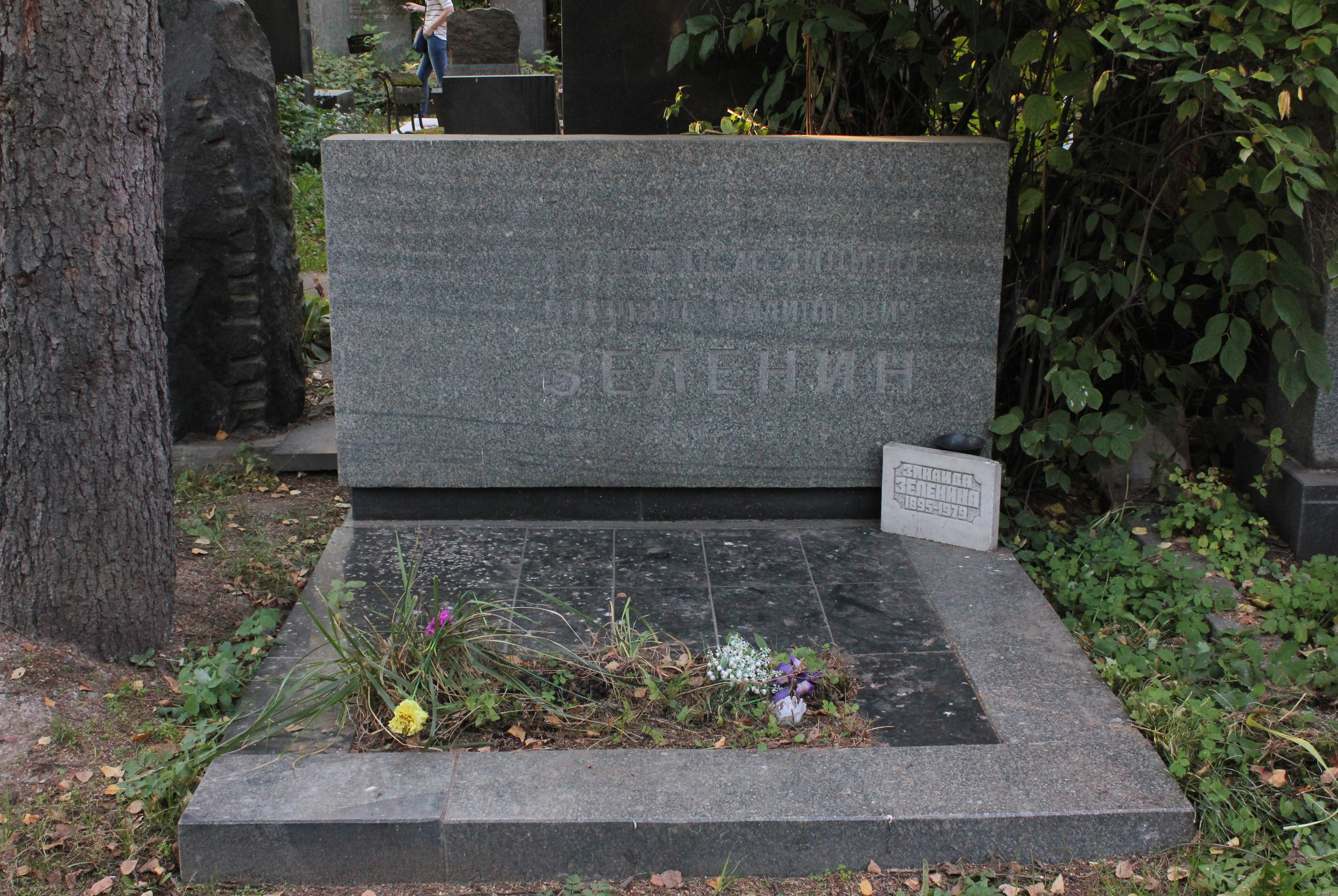 Могила Зеленина Владимира Филипповича (1881-1968), врача-терапевта: Новодевичье кладбище, Хамовники, Центральный округ, Москва